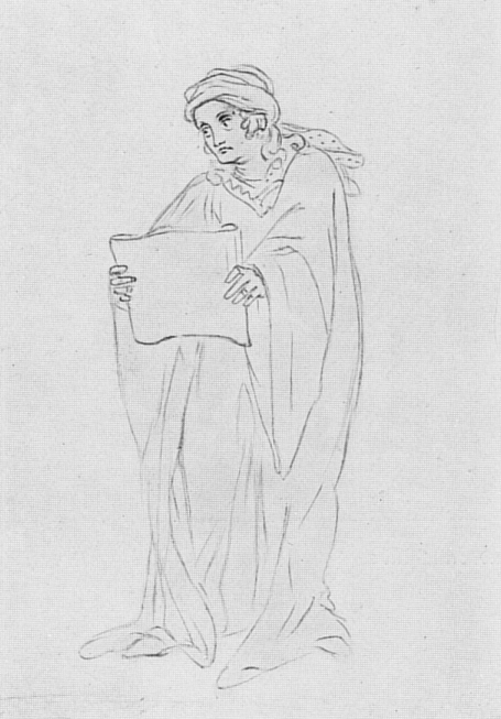 August Wilhelm Iffland als Sophir Goethe-Nationalmuseum